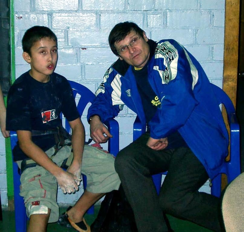 2002 год, ПСТК "Алькор"